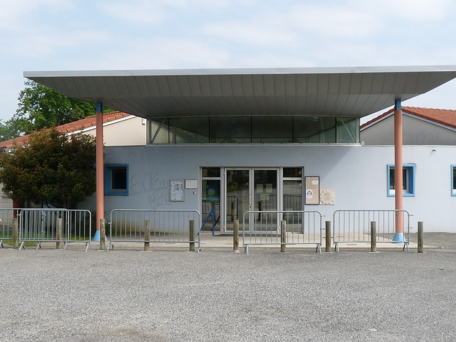 École primaire, Montlaur, Haute-Garonne, France